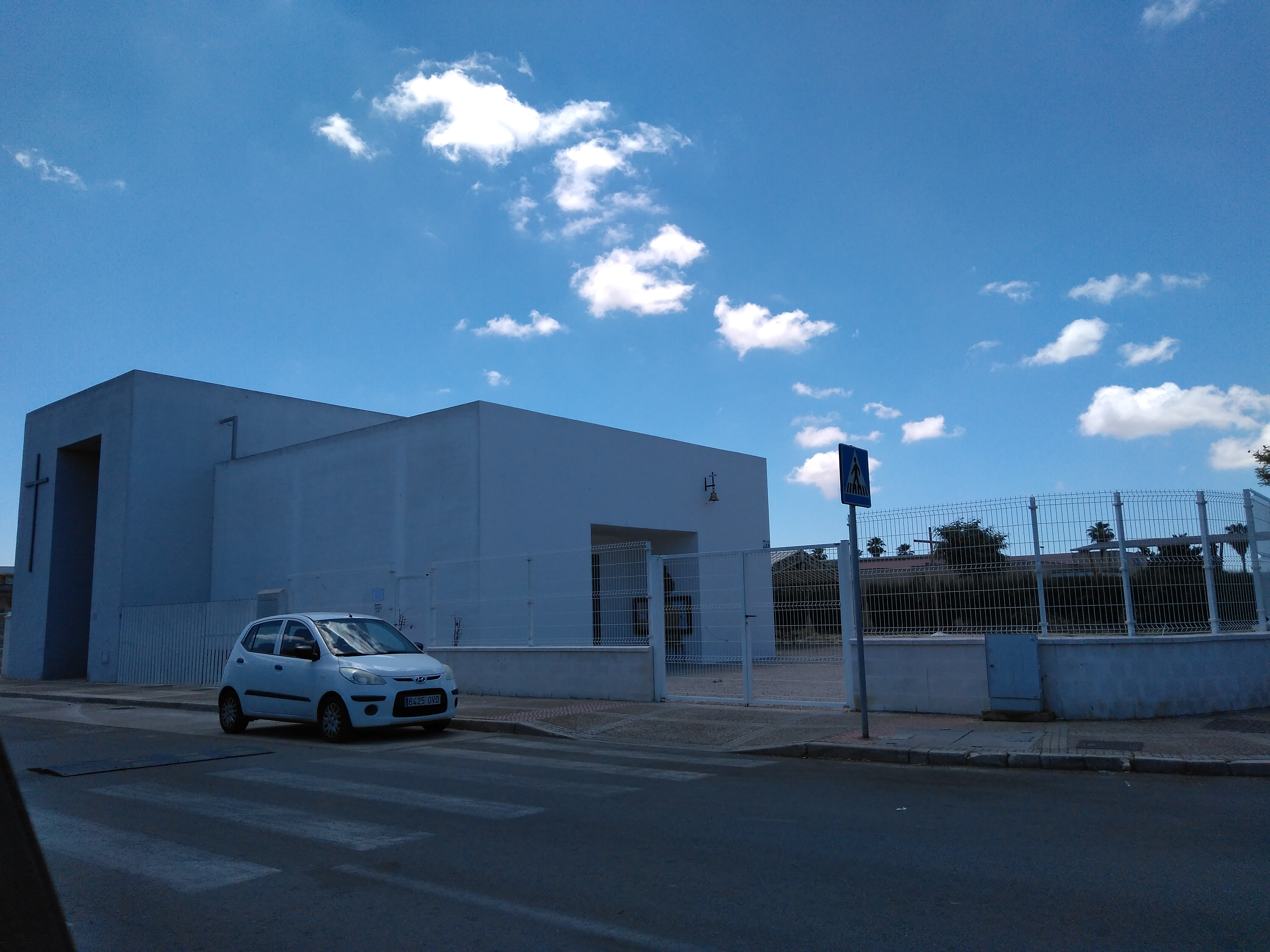 frontal de la Parroquia de San Juan Grande y Nuestra Señora de la Candelaria